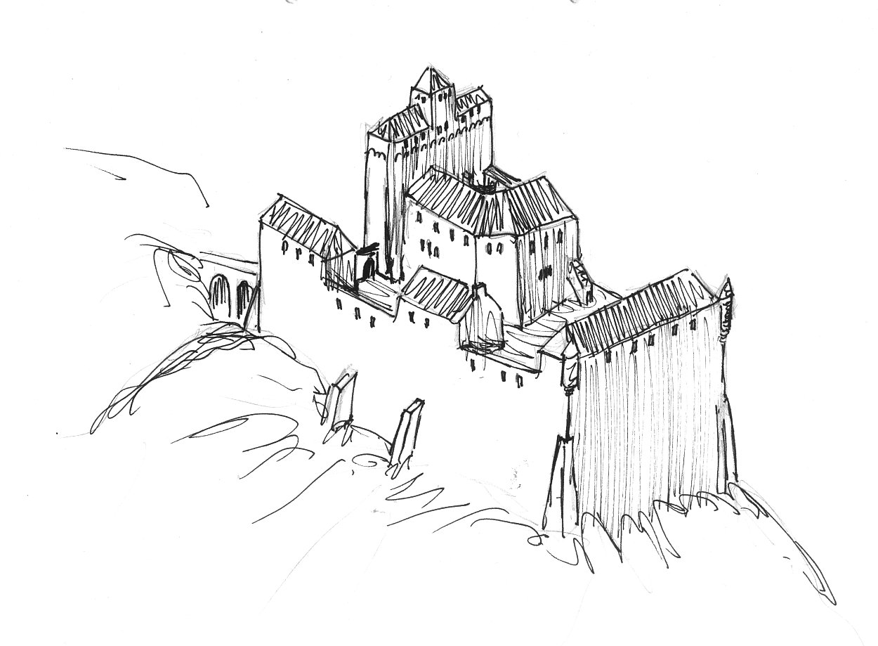 Rietburg bei Rhodt (Pfalz), eigenhändige Rekonstruktionszeichnung (frei nach Arndt Hartung